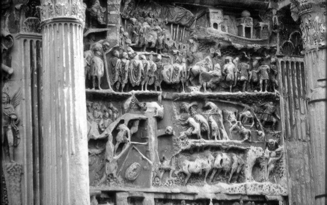 Arco di Settimio Severo nel Foro Romano (Roma), uno dei rilievi Foto scattata da MM